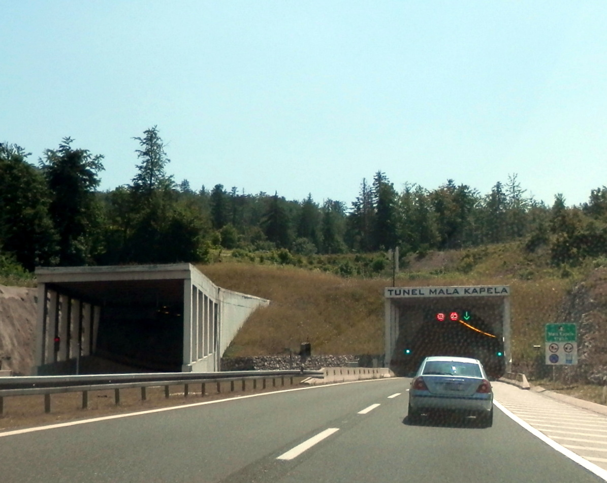 "Mala Kapela" Tunnel. Diaľnica A1 v Chorvátsku. Leto 2013